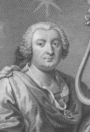 Retrato em gravura, póstumo, do compositor português Carlos Seixas, idealizado por Vieira Lusitano e executado por Jean Daullé. Versão cortada.